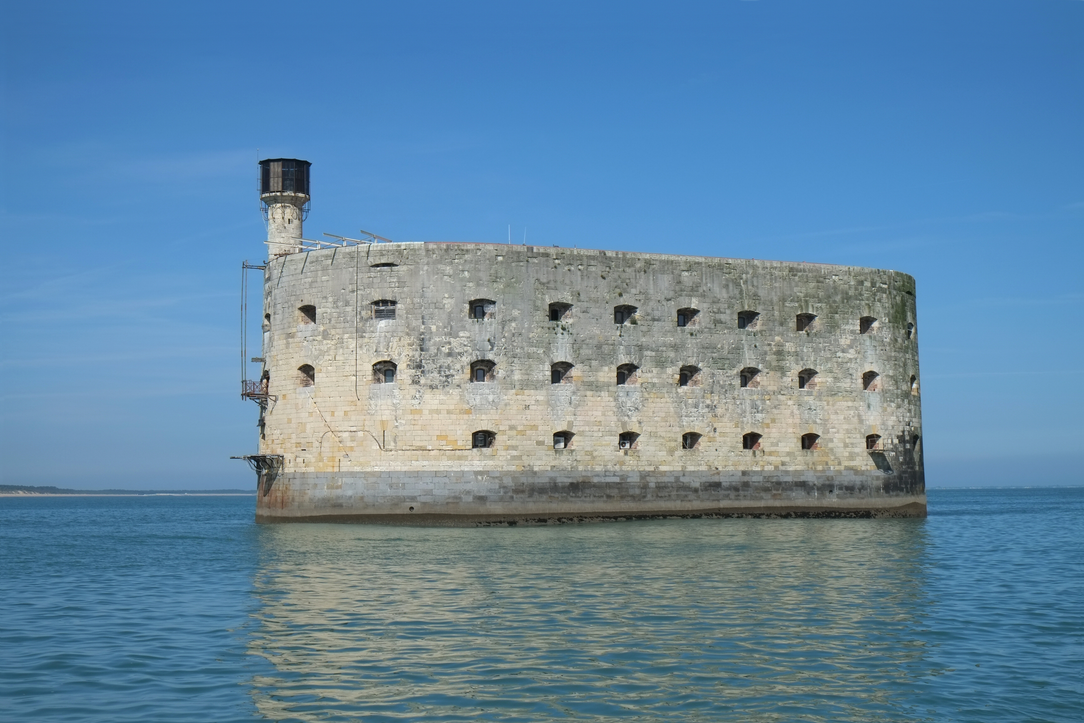 Le Fort Boyard Île d'Aix Charente-Maritime France .